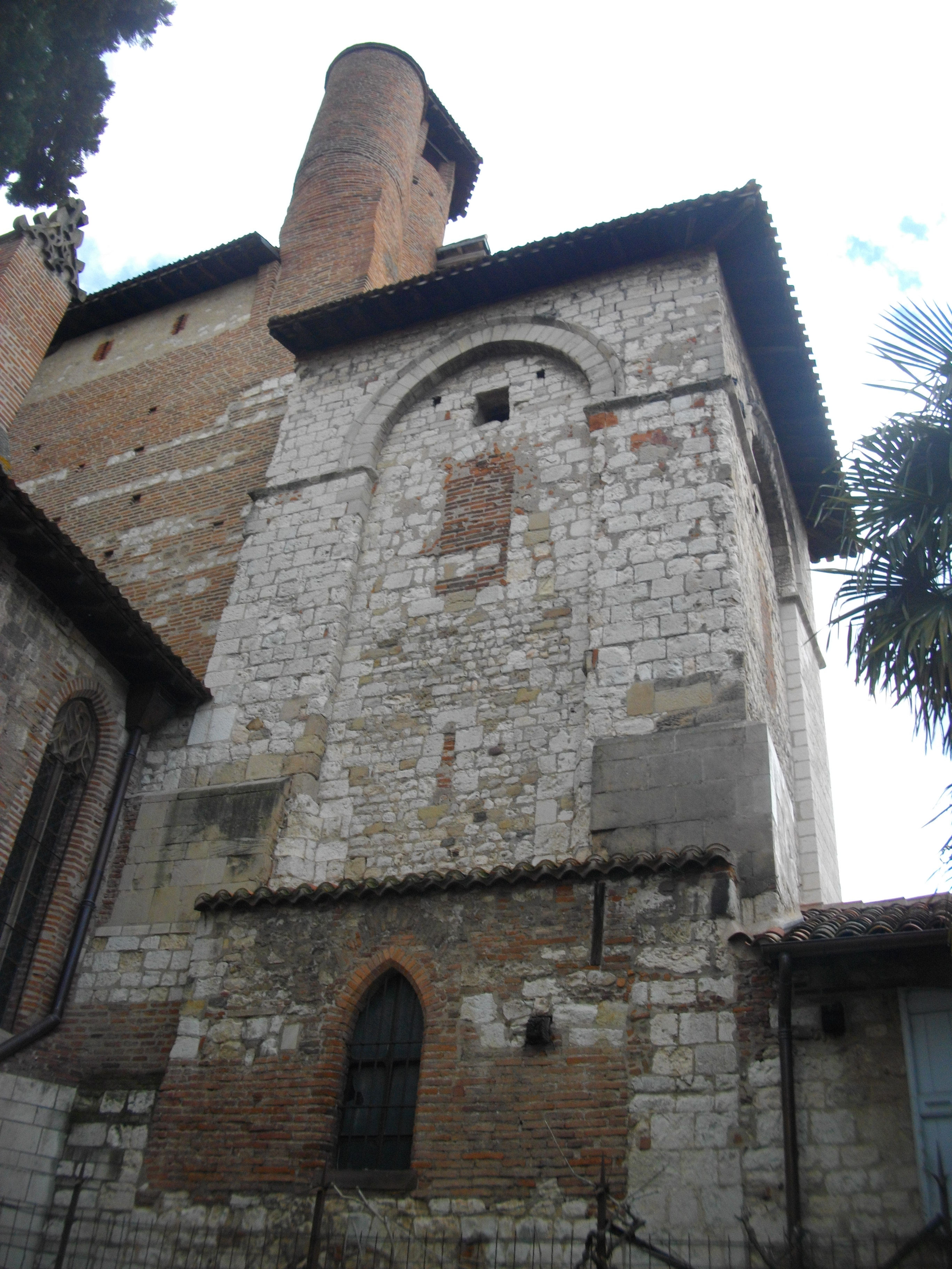 Tour sud présentant de nombreux aménagements, mêlant la pierre et la brique, à la chronologie difficile à lire pour les historiens. Elle est visible depuis le cloitre.